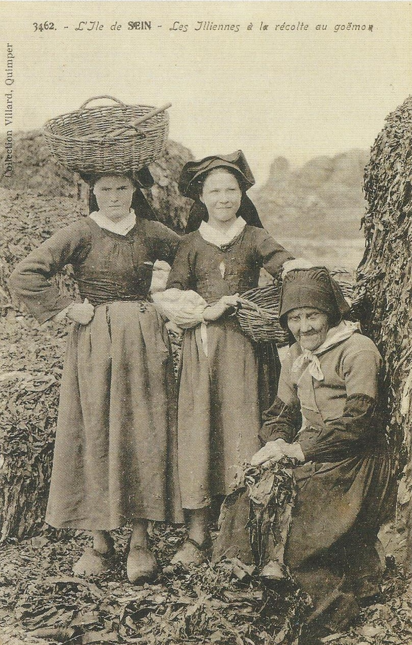 Île de Sein : Femmes partant à la récolte du goémon (carte postale, collection Villard [Joseph-Marie Villard 1868-1935])